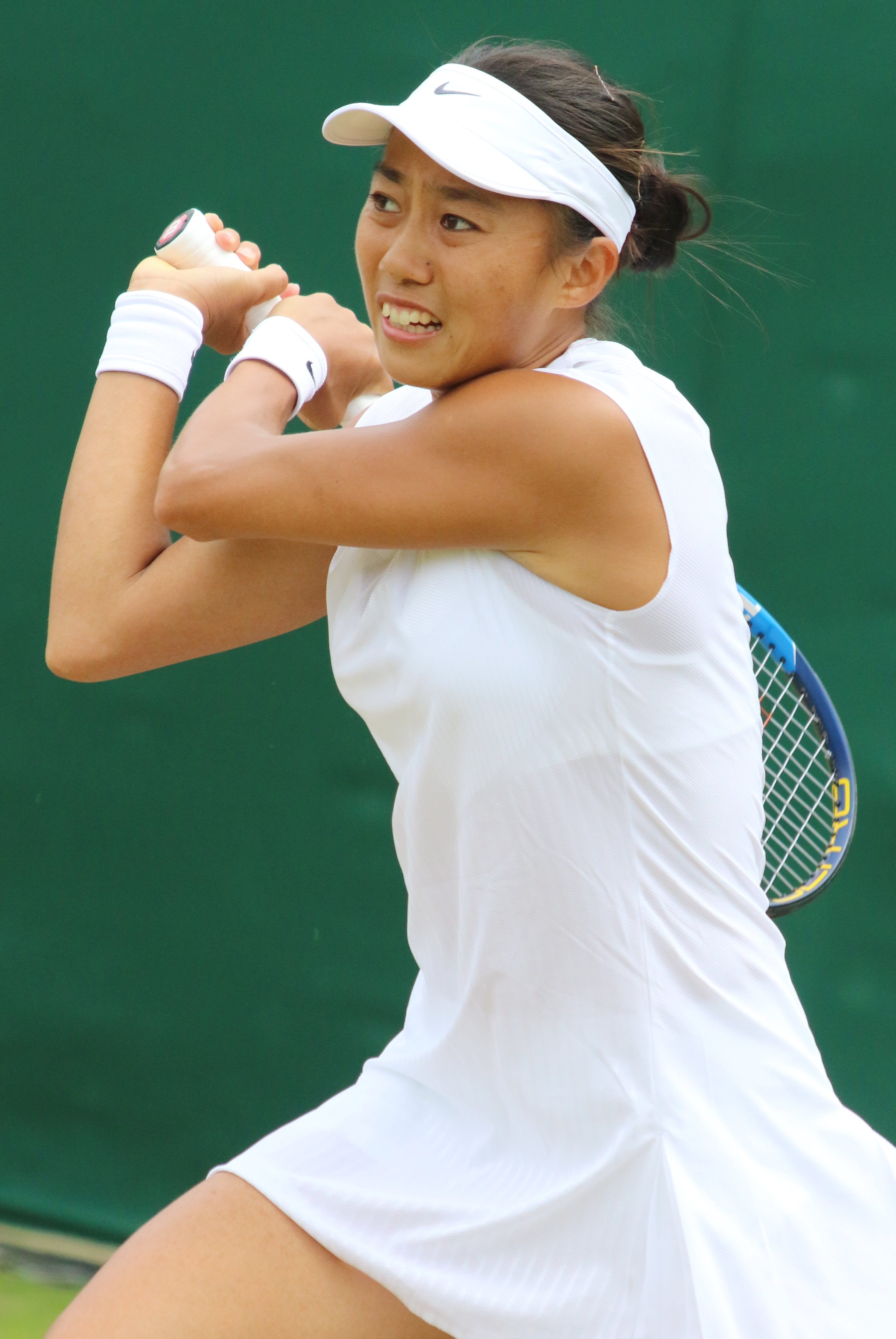 Zhang WM17 (1)